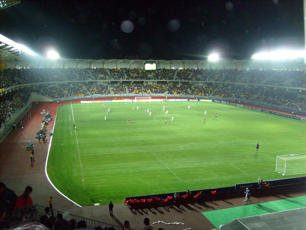 Estadio Francisco Sánchez Rumoroso (3er asiento :P). Chile-Inglaterra